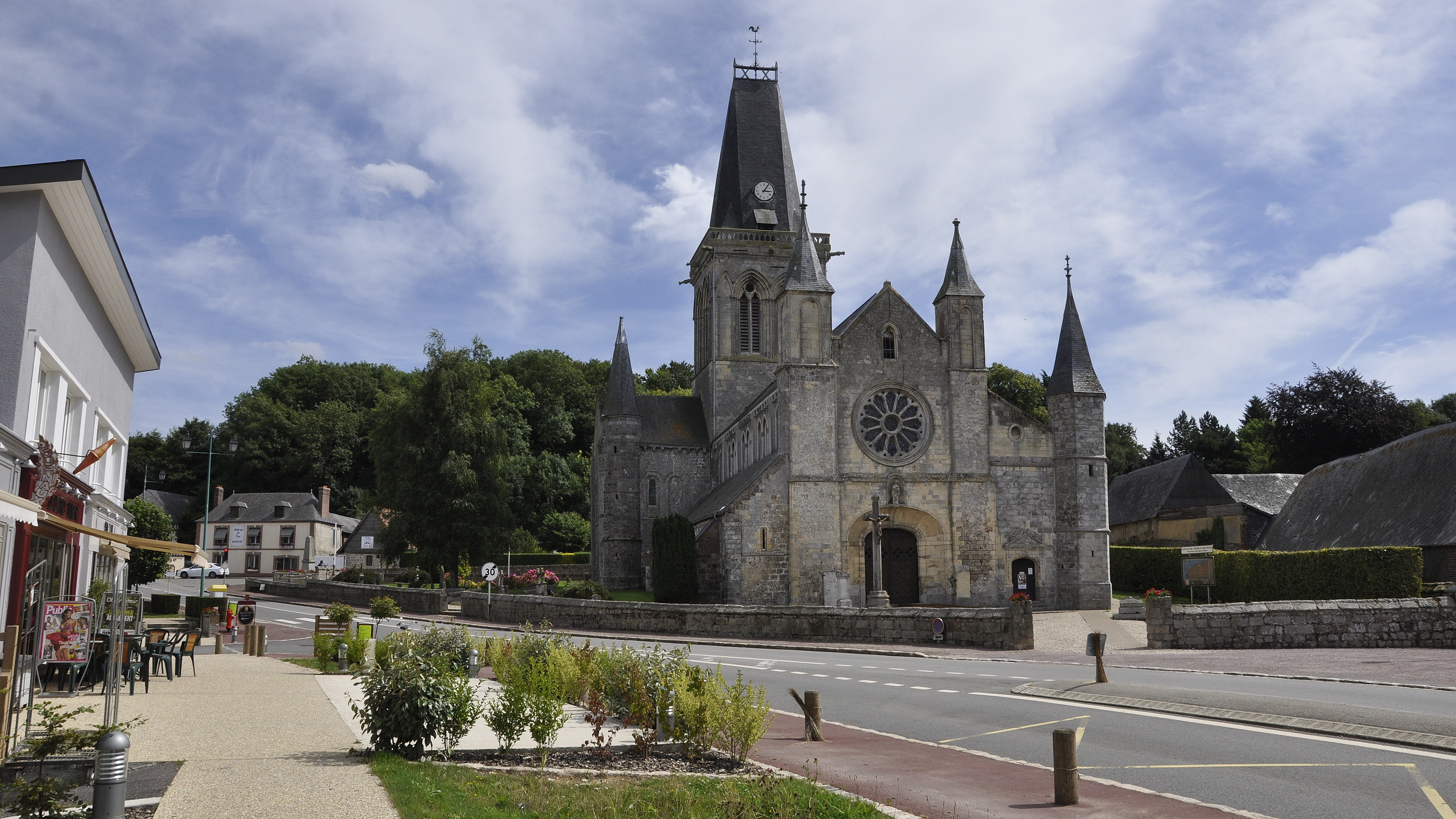 De Onze-Lieve-Vrouwekerk van Le Bourg-Dun, Frankrijk